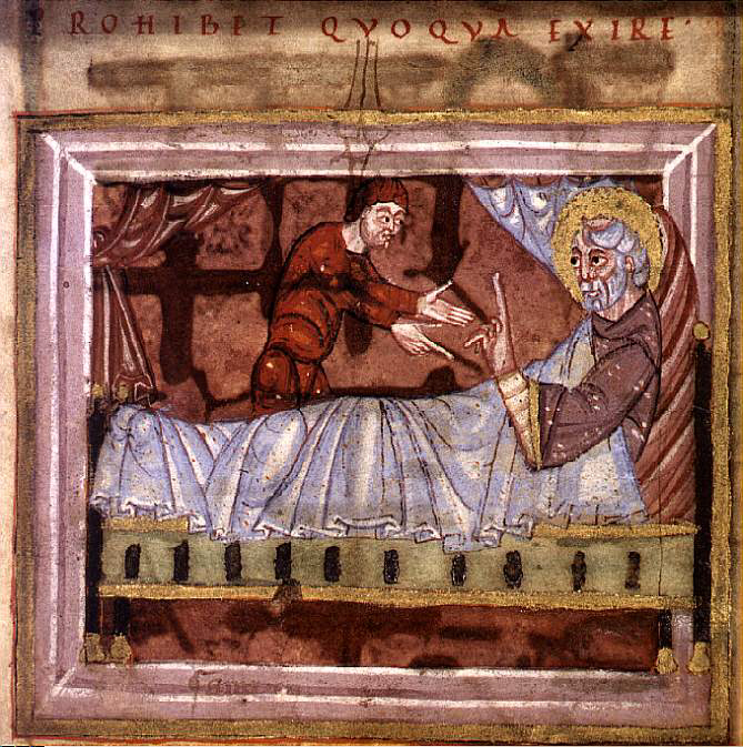 Omer et son serviteur ; Vie de Saint Omer ; XIe s, Chapitre de la Cathédrale ; Ms 698. Bibliothèque municipale de saint-Omer.